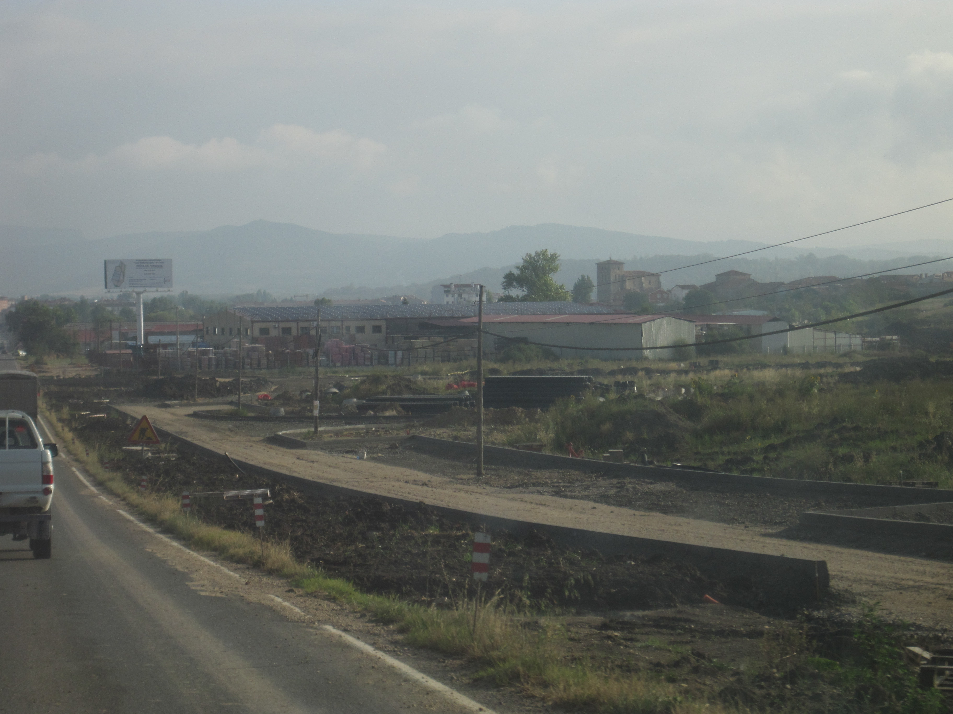 Vista de las obras de ampliación del Polígono de Villarcayo.